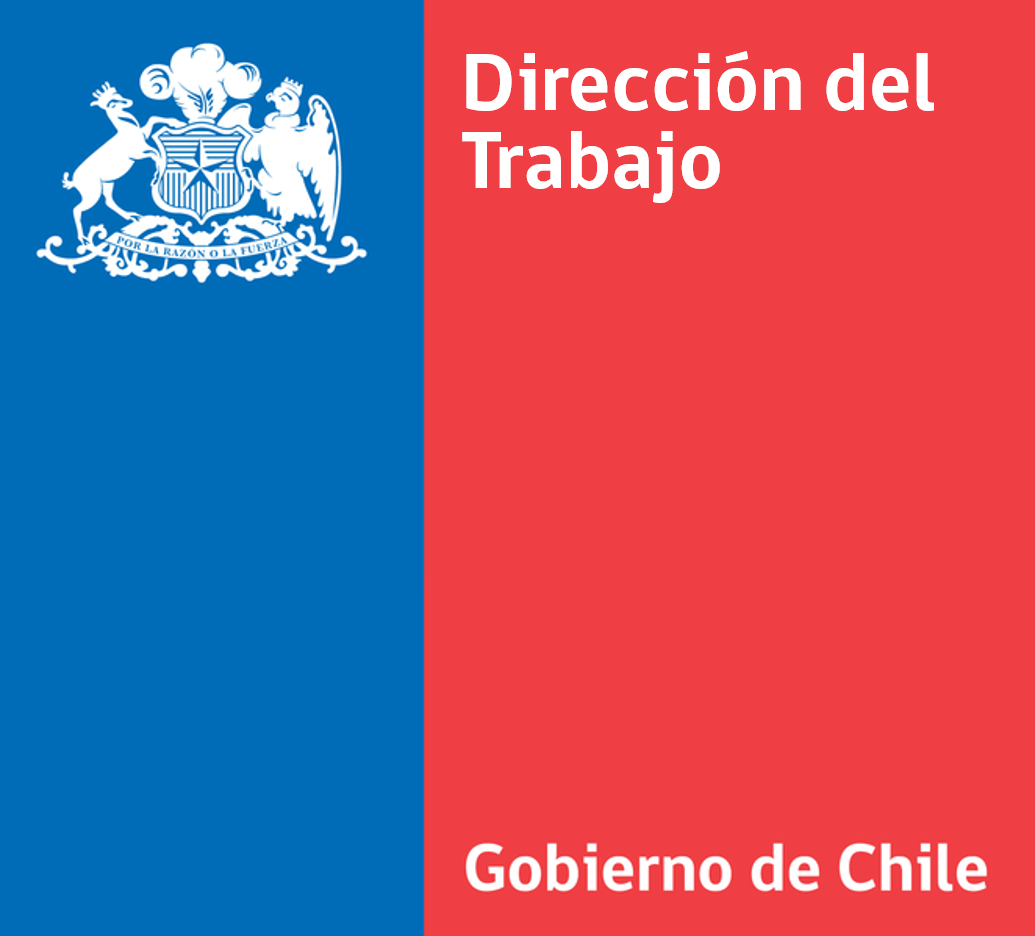 Logo de la Dirección del Trabajo de Chile.